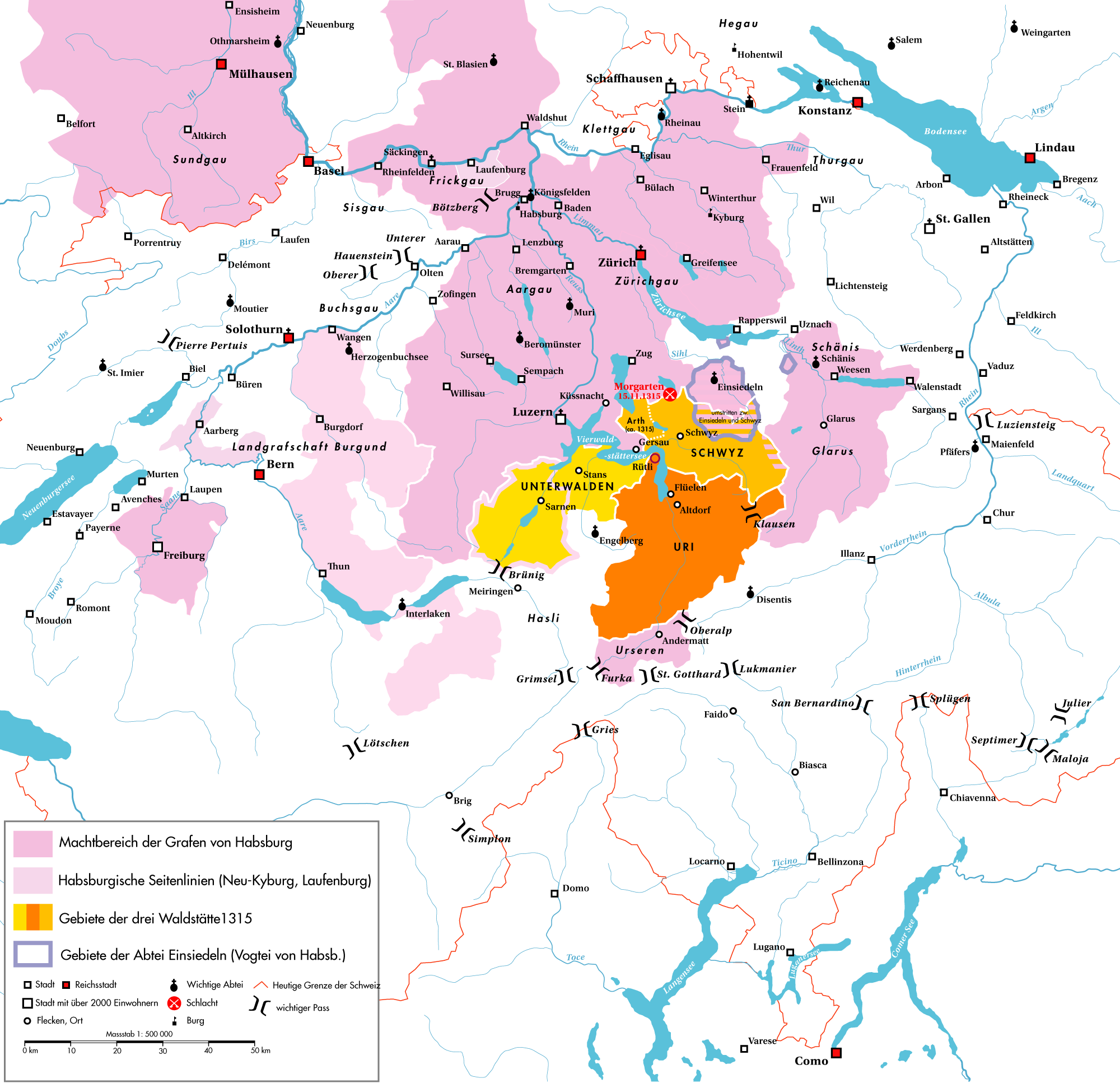 Die Eidgenossenschaft und Habsburg im schweizerischen Mittelland und Alpenraum um 1315 vor der (Schlacht bei Morgarten)